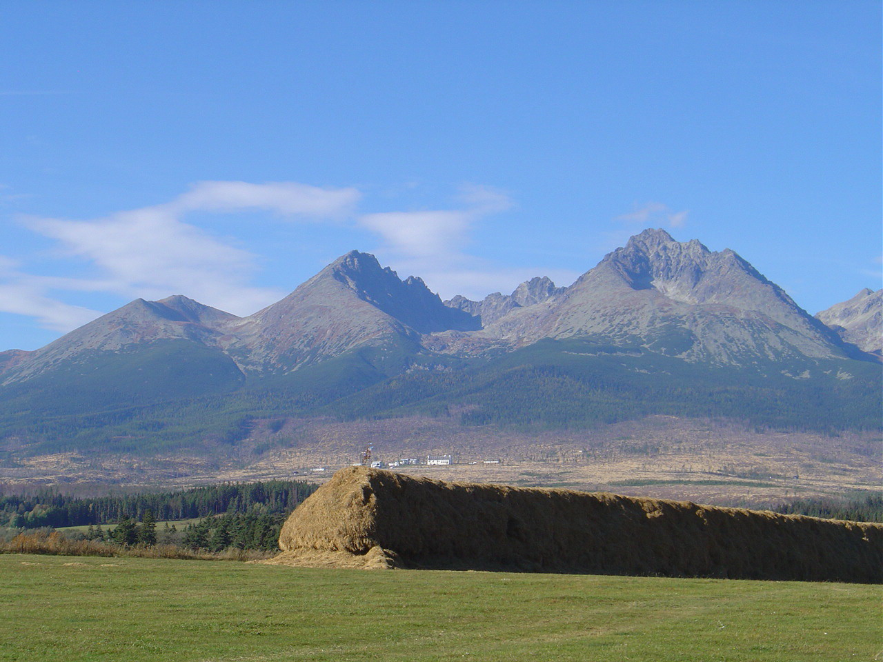 Tupá, Končistá and Gerlachovský štít